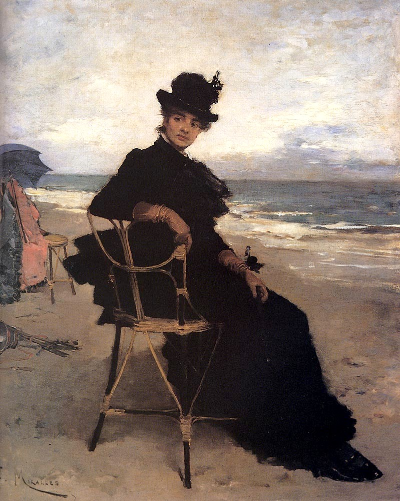 La Femme en noir, huile sur toile de Francesco Miralles Galup (1848-1901)